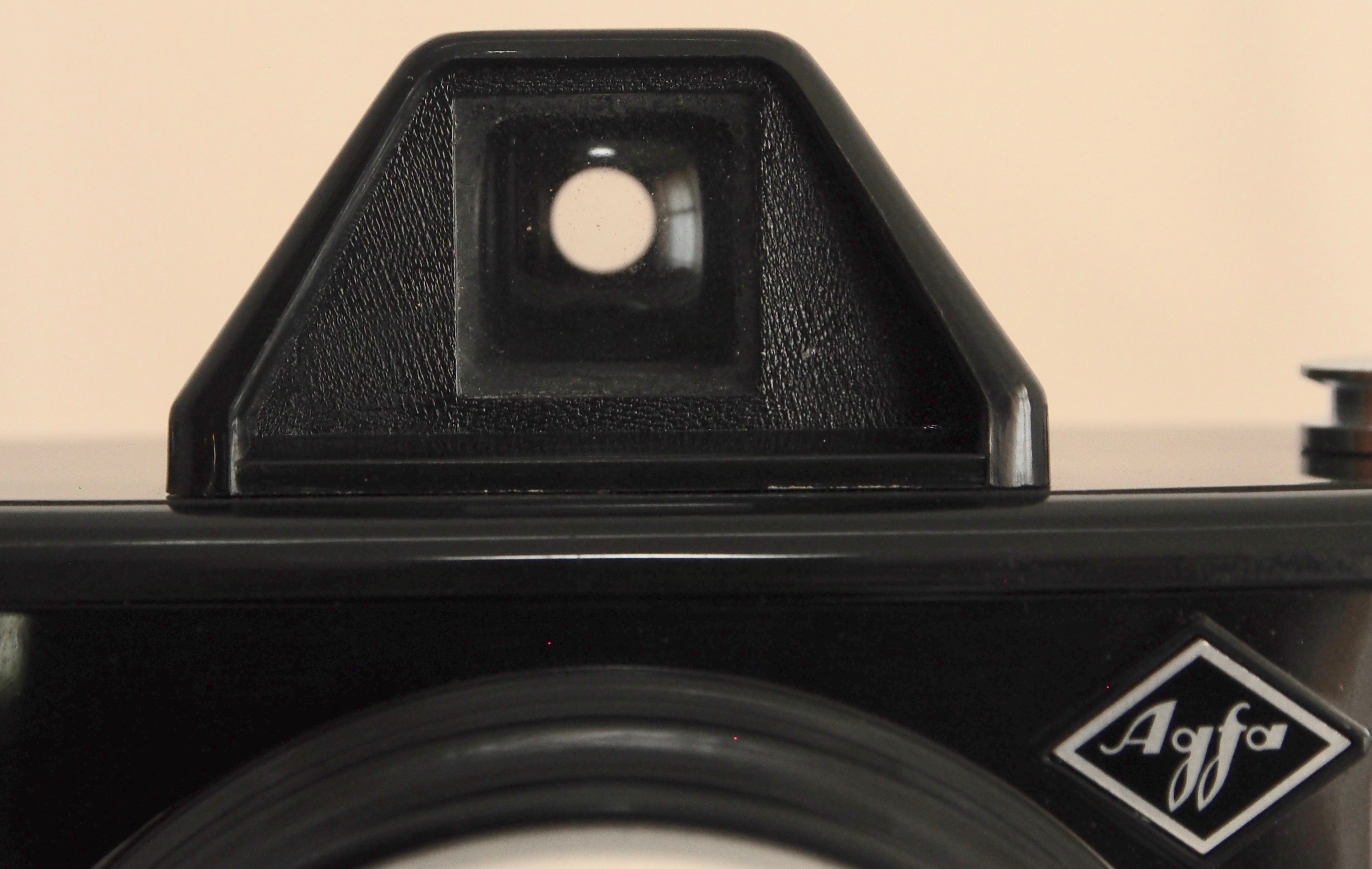 Click Sucher senkrecht